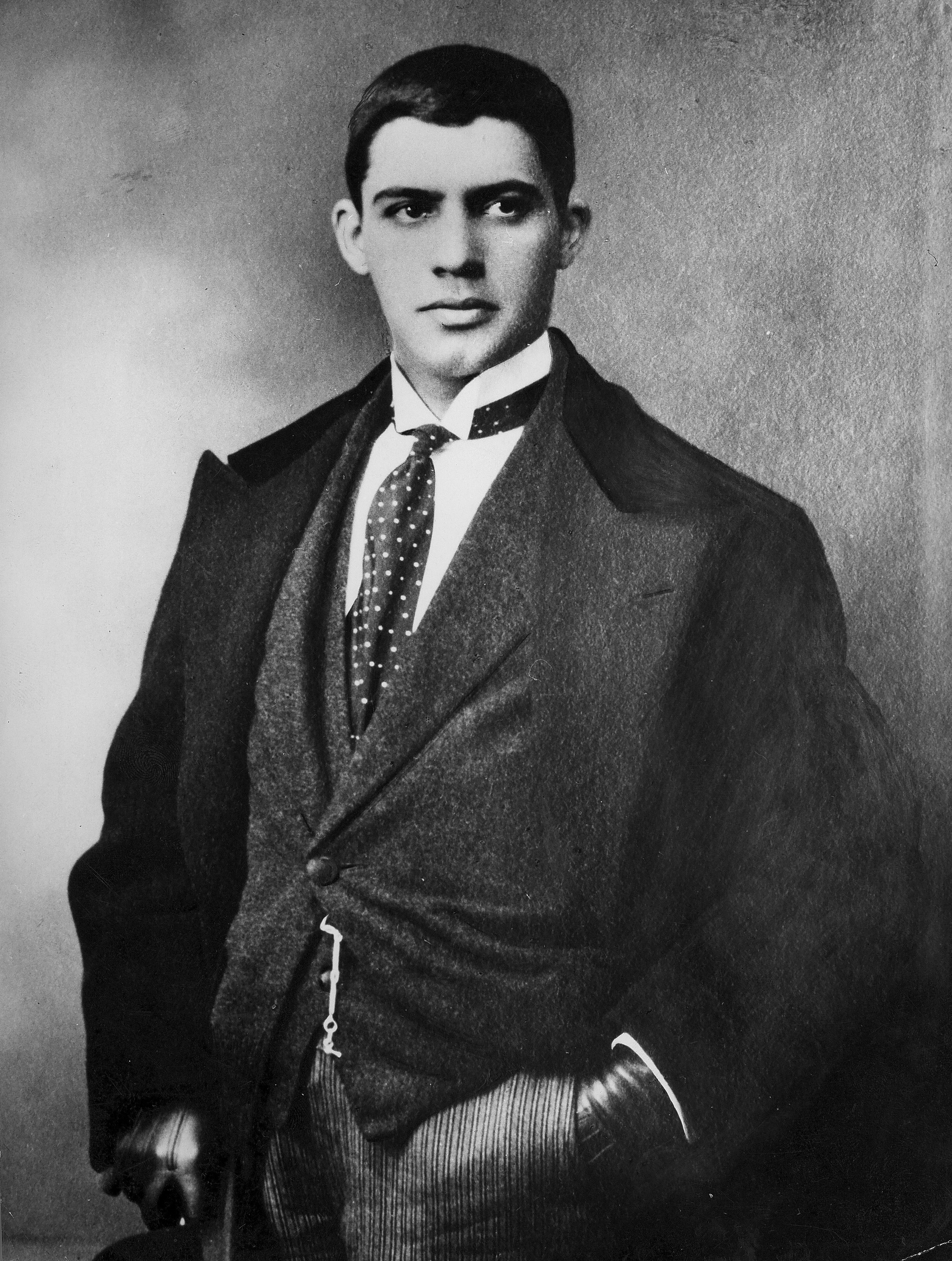 Amadeo de Souza-Cardoso [ASC01-70 IC]